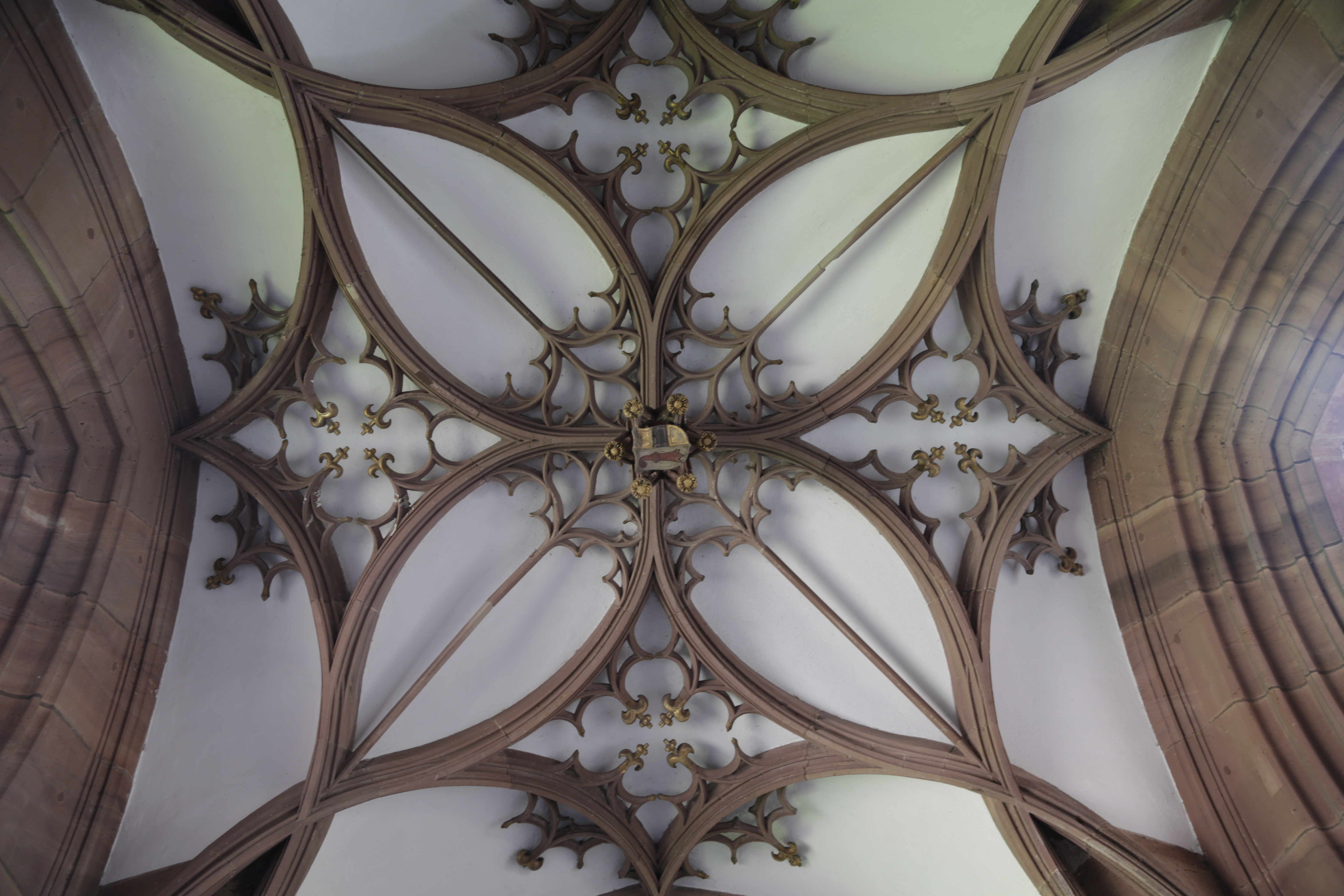 In der Decke des grossen Kreuzgang des Basler Münster ist als Rippennetz und bunten Schlusssteinen ausgeführt.